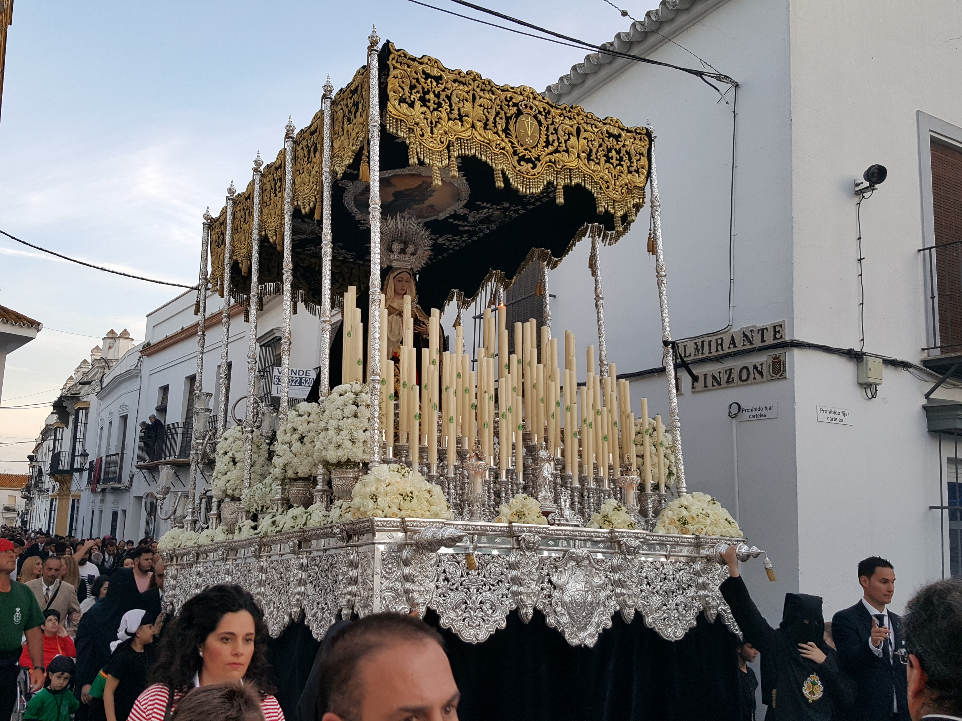 Hermandad del Cristo de la Vera-Cruz. Desfile procesional del Viernes Santo tarde. Vista de paso de la Virgen de la Soledad por el casco urbano de Moguer